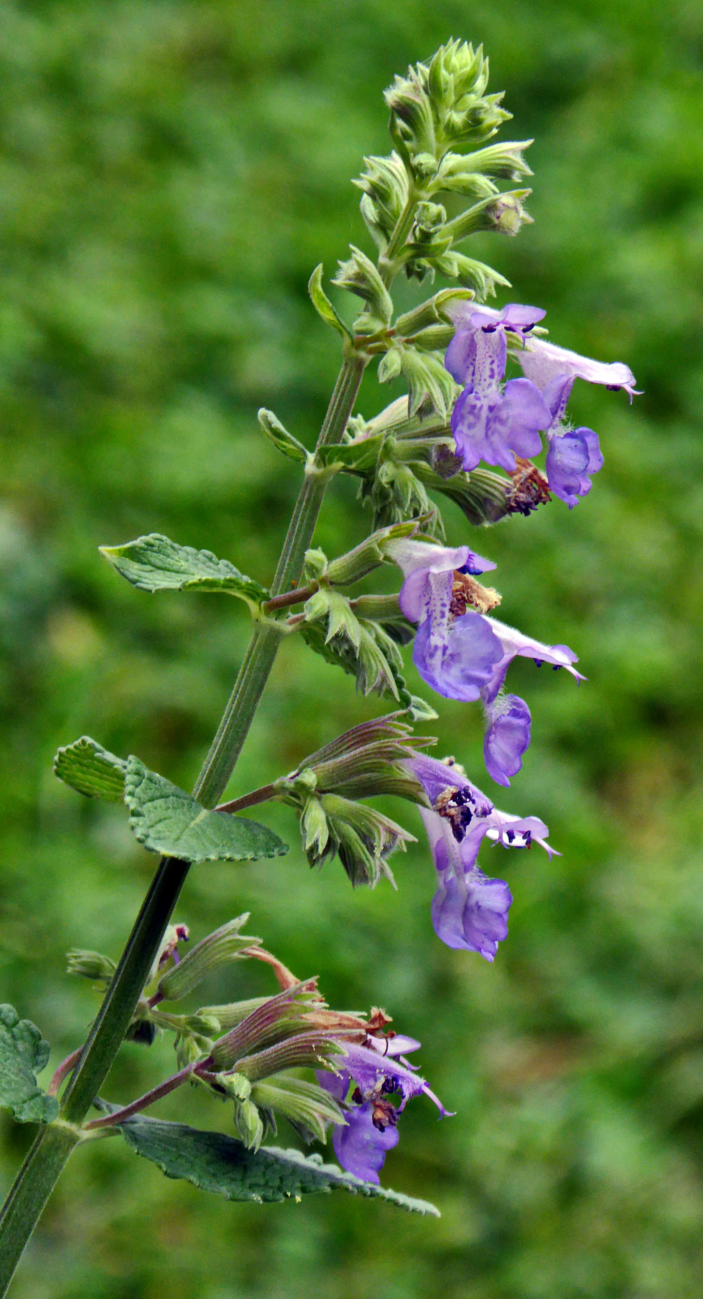 Blütenstand der Katzenminze im Kräutergarten des Klosters „Zum Heiligen Kreuz“